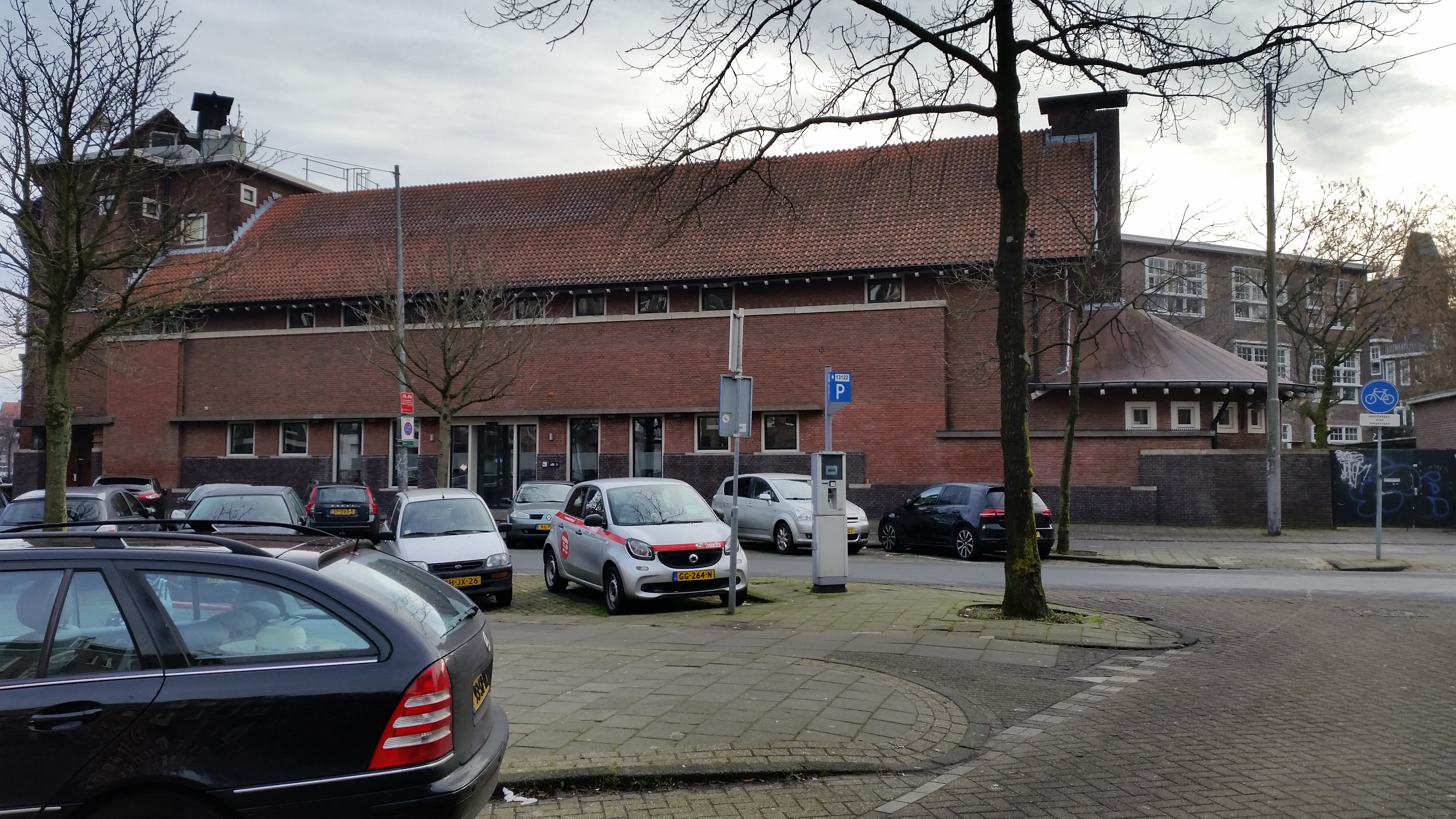 Impressies Pijnackerstraat, Amsterdam-Zuid, december 2019